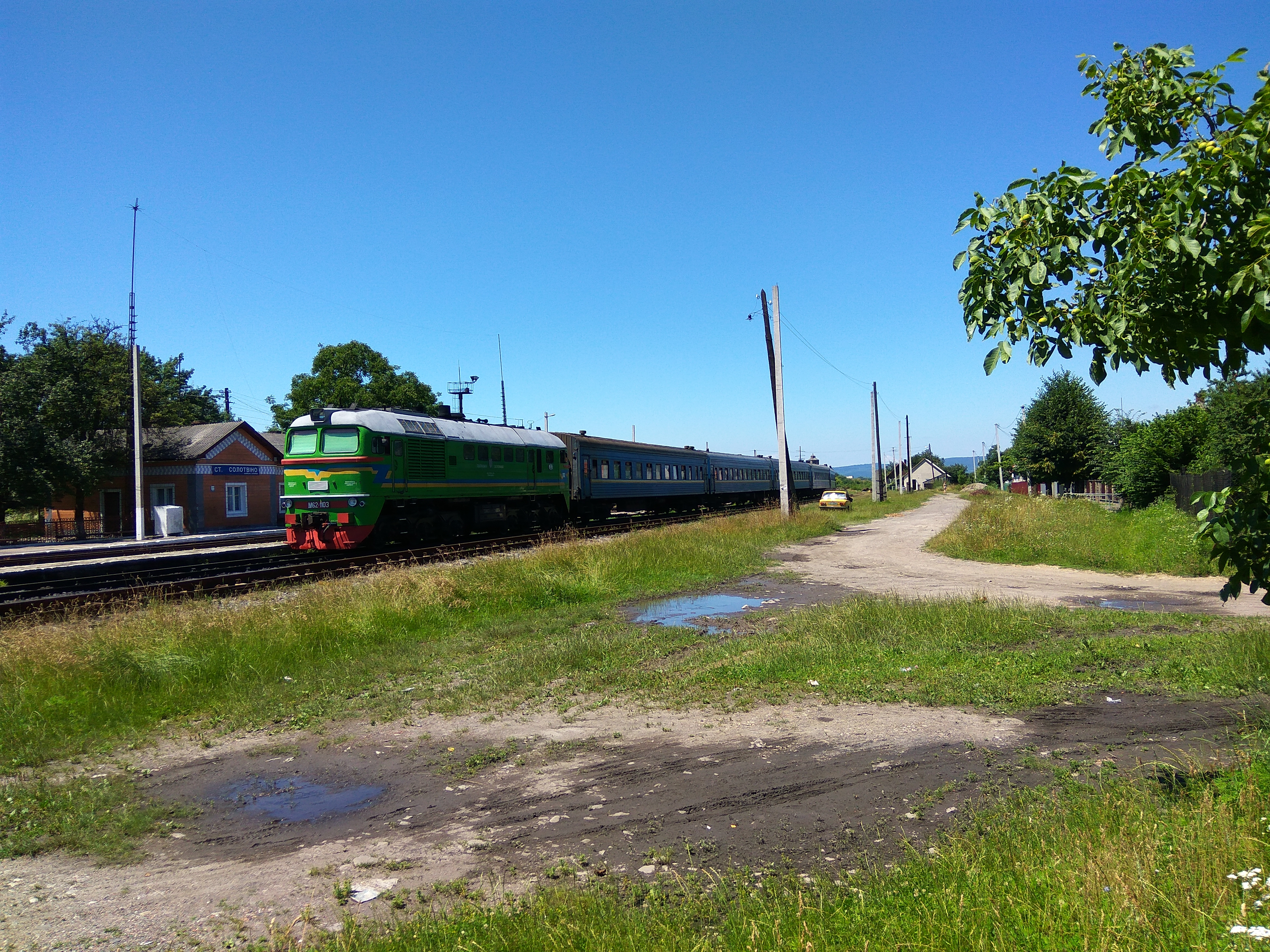 Станція Солотвино-1